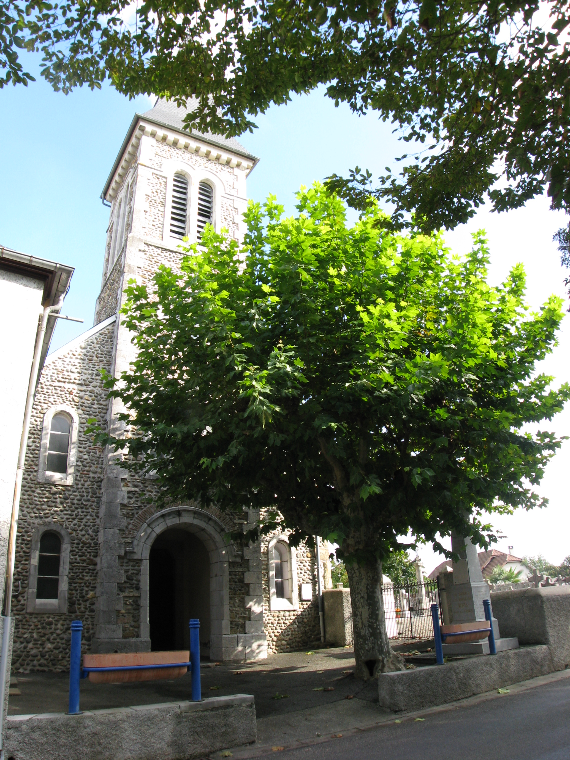 Eglise d'Os Marsillon (Pyrénées Atlantiques) Pyrénées).